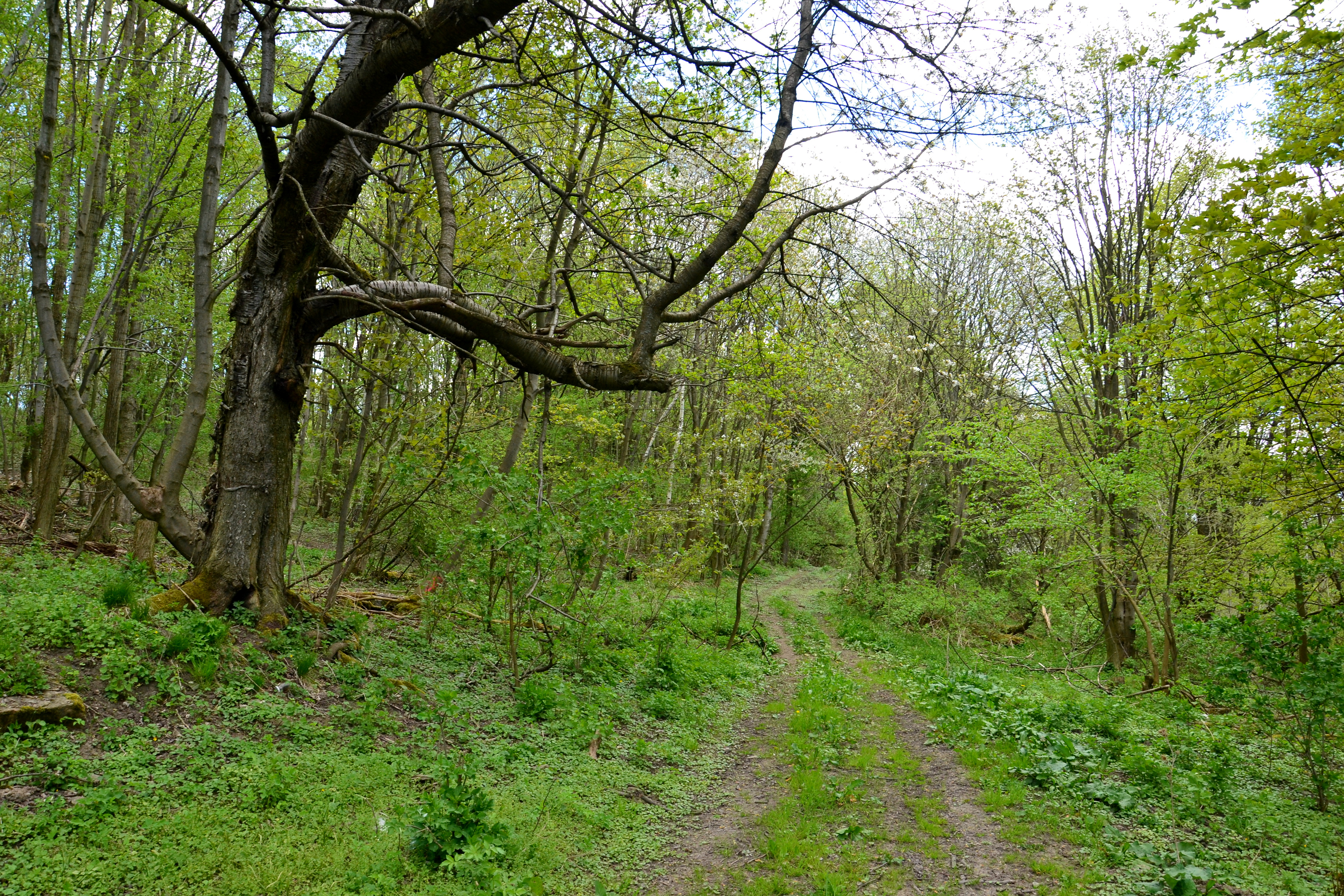 Místo, kde vesnice stávala.